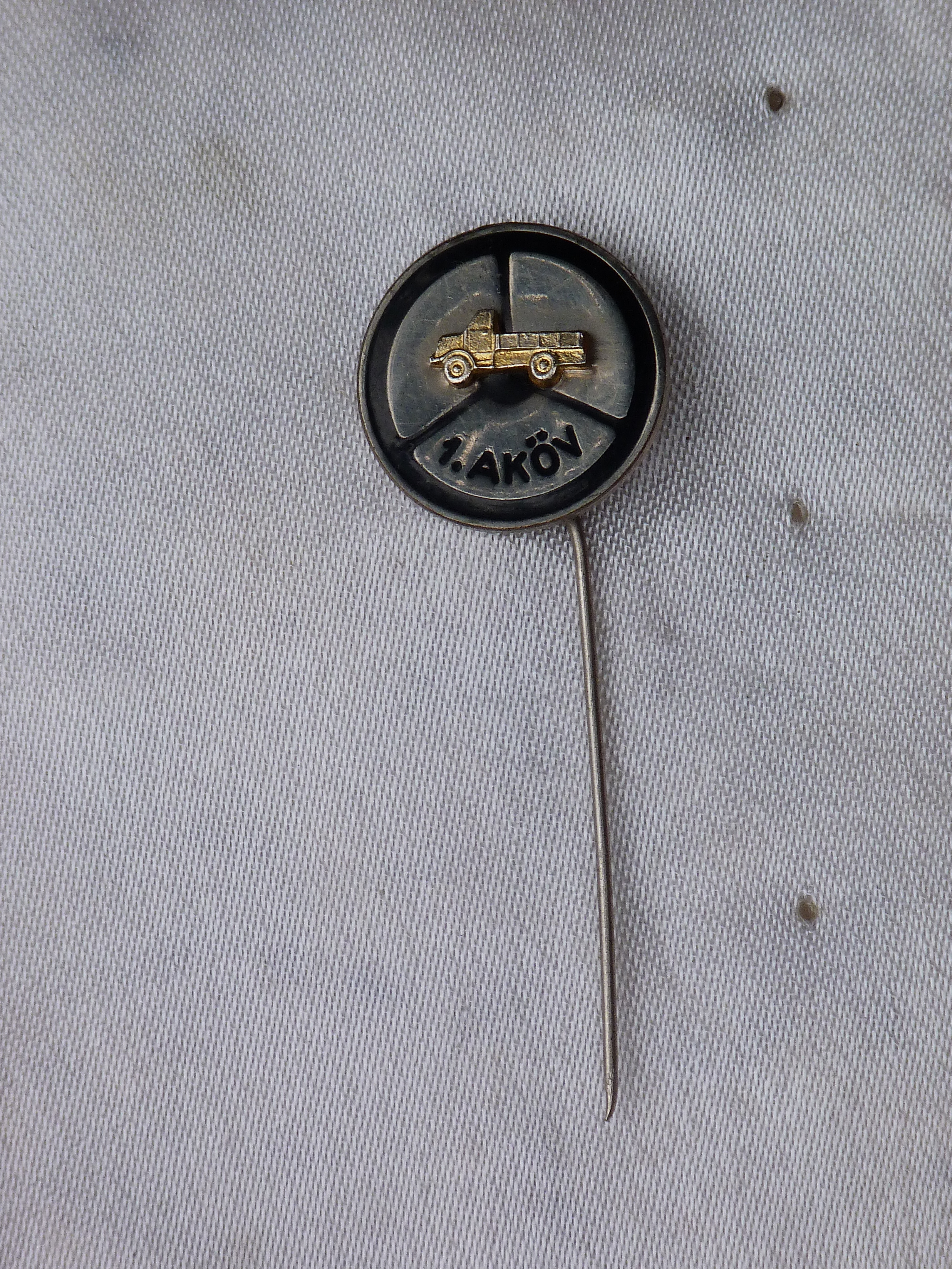 A felvétel 2015. január 9-én, pénteken készült Budapesten. Jelvény: '. AKÖV. '. számúó Autóközlekedési Vállalat. ©© Derzsi Elekes Andor, Budapest, 2015, A kép másolását, bármilyen úton történő sokszorosítását és felhasználását a szerző ellenérték nélkül, jogutódjaira is kihatóan megengedi. Az engedély kiterjed a kereskedelmi célú hasznosításra is. Kéri azonban nevének feltüntetését a felhasználás során. A Metapolisz sorozat valamennyi képe és filmje Creative Commons alatti valamint kereskedelmi - for profit - célra is felhasználható. Ajánlott hivatkozás: Derzsi Elekes Andor: Metapolisz DVD line